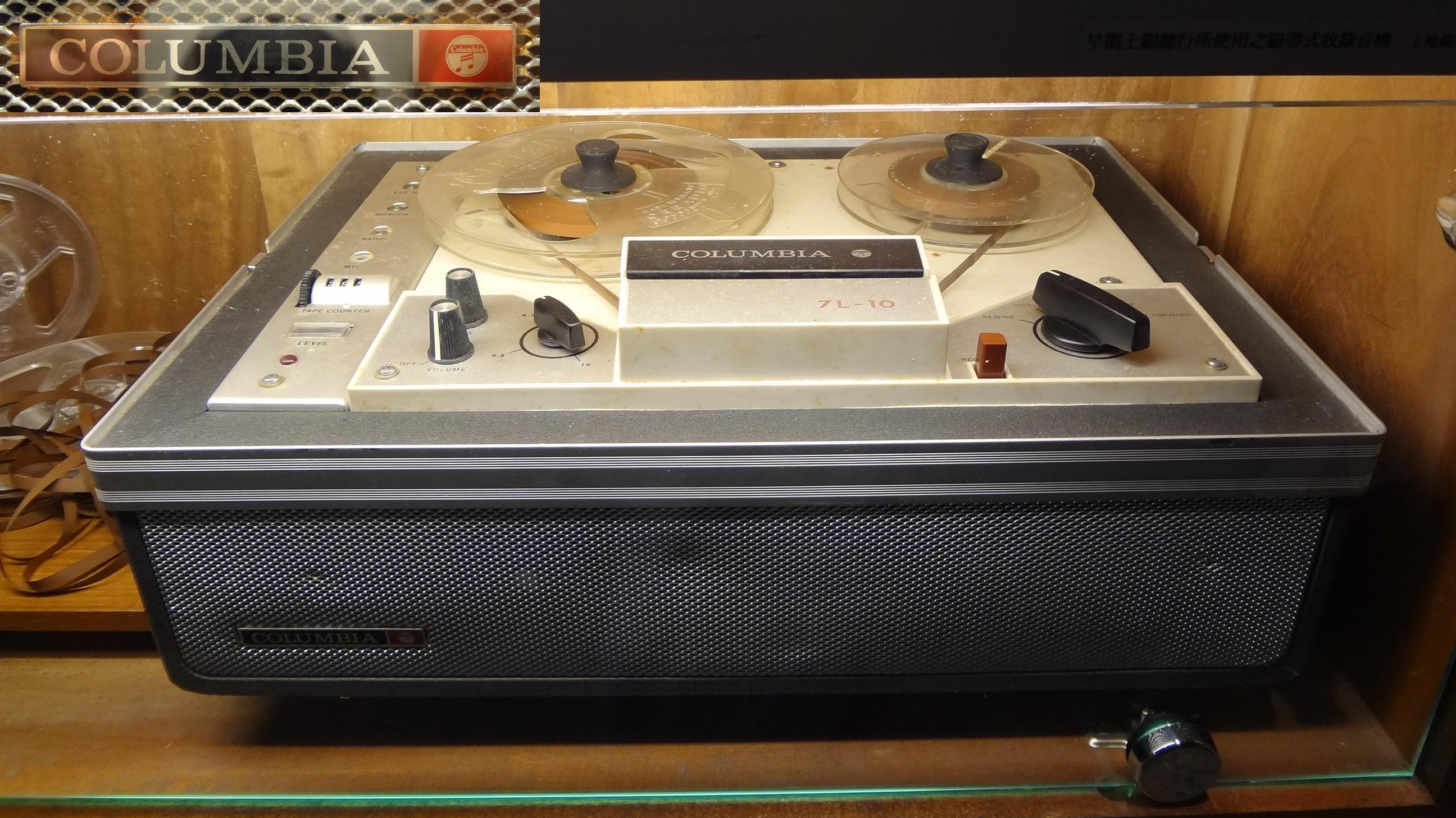 國立臺灣博物館土銀展示館展示的日本哥倫比亞錄音機7L-10。